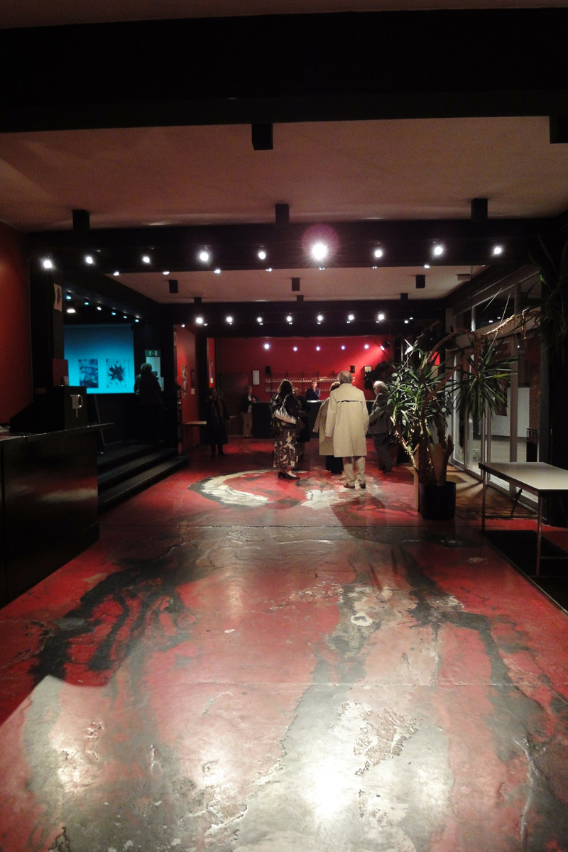 Espace bar-hall d'entrée du Théâtre 140 à Bruxelles. Peinture au sol de J.-M. de Busscher.